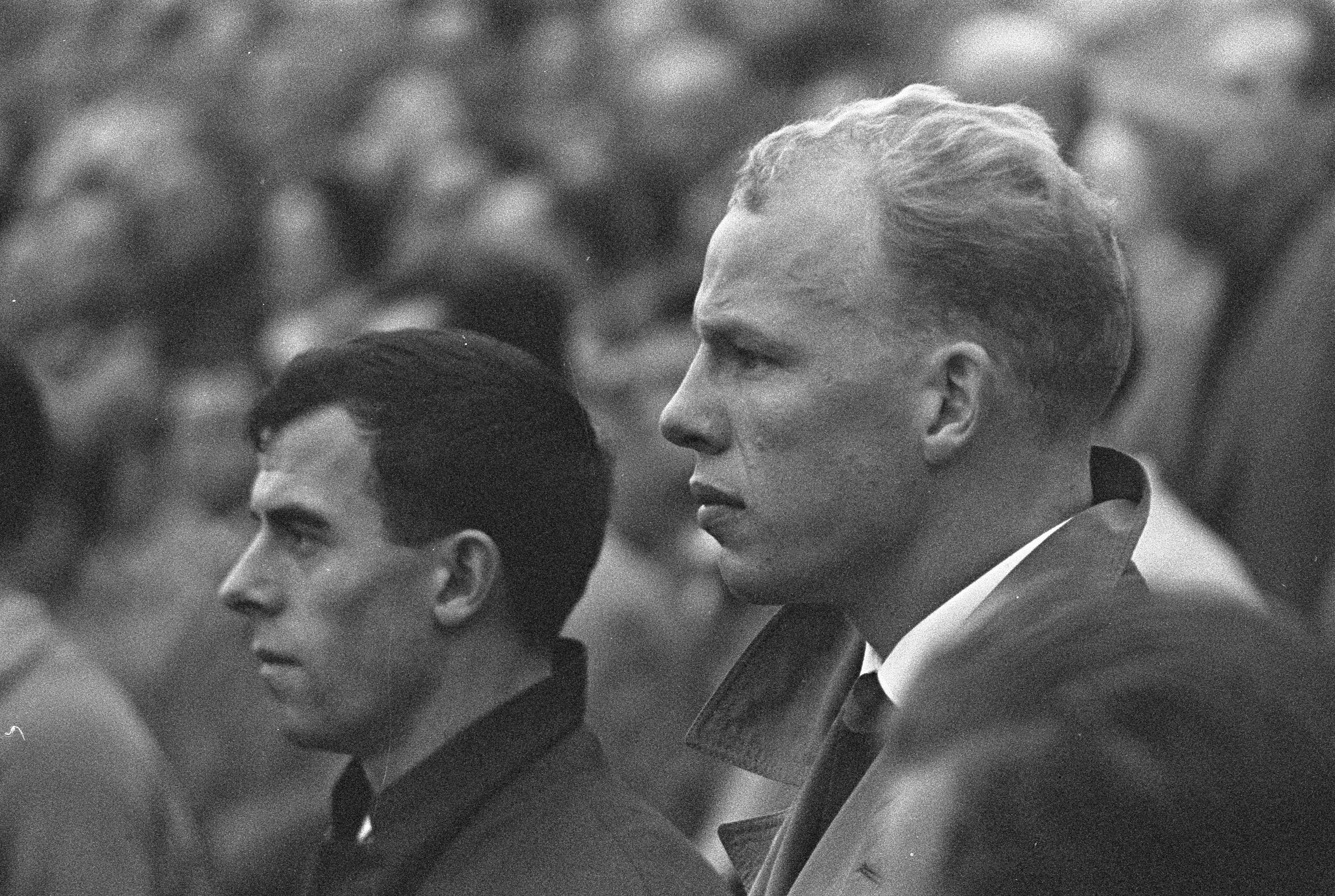 Collectie / Archief : Fotocollectie Anefo Reportage / Serie : Voetbal Duitsland - Nederland 7-0 in Keulen Beschrijving : Coen Moulijn en Roel Wiersma tijdens het spelen van de volksliederen Datum : 21 oktober 1959 Locatie : Duitsland, Keulen Trefwoorden : sport, voetbal Persoonsnaam : Moulijn, Coen, Wiersma, Roel Fotograaf : Noske, J.D. / Anefo Auteursrechthebbende : Nationaal Archief Materiaalsoort : Negatief (zwart/wit) Nummer archiefinventaris : bekijk toegang 2.24.01.05 Bestanddeelnummer : 910-7643